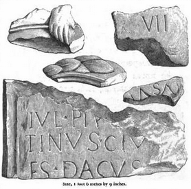 Abbildung Fragmente von römischen Reliefs und Grabsteinen, gefunden im 19. Jahrhundert in Burgh-by-Sands und Beaumont, England.